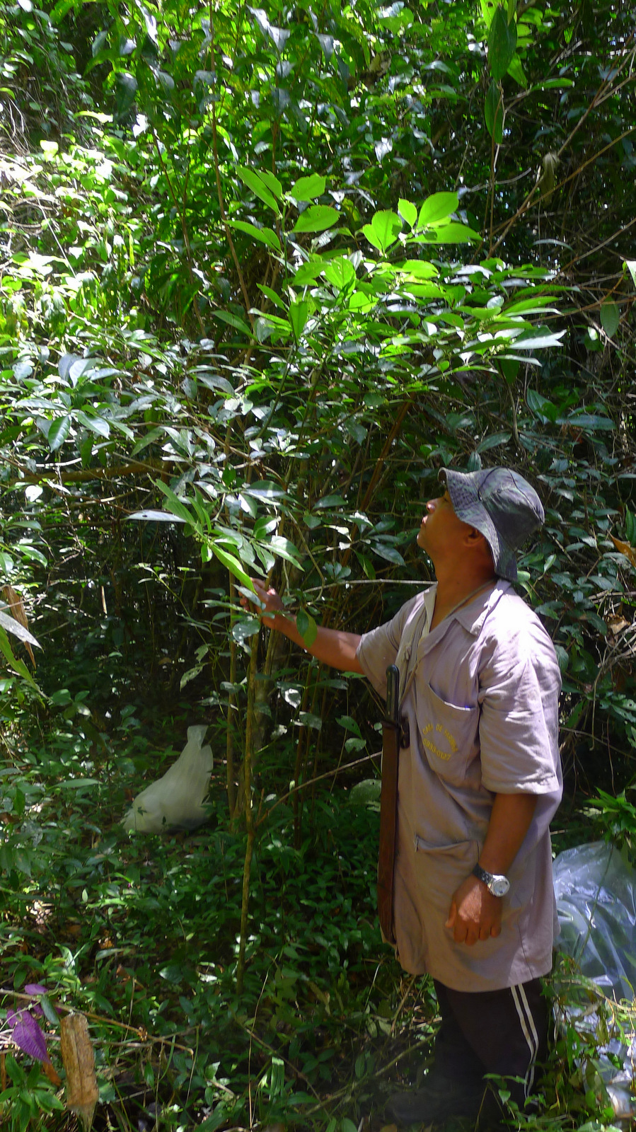 Aureliana fasciculata var. longifolia (Sendtn.) Hunz. & Barboza